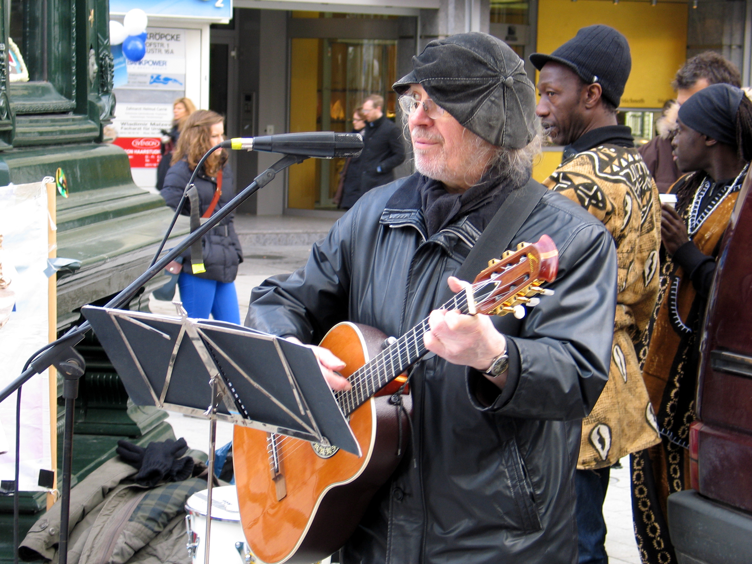 Fotos vom Ostermarsch 2013 in Hannover, veranstaltet von attac Hannover, DFG-VK Hannover (Deutsche Friedensgesellschaft - Vereinigte KriegsdienstgegnerInnen), DKP Hannover-Kreis, Friedensbüro Hannover e.V., Die Linke, Region Hannover, Kargah e.V., Initiative "Kein Militär mehr", Kurdistan Volkshaus, MISO-Netzwerk Hannover, MC Kuhle Wampe, Hannover, radio flora Hannover, unique planet, VVN-BdA Hannover, Zukunftsforum hannoverscher GewerkschafterInnen und vielen anderen ...